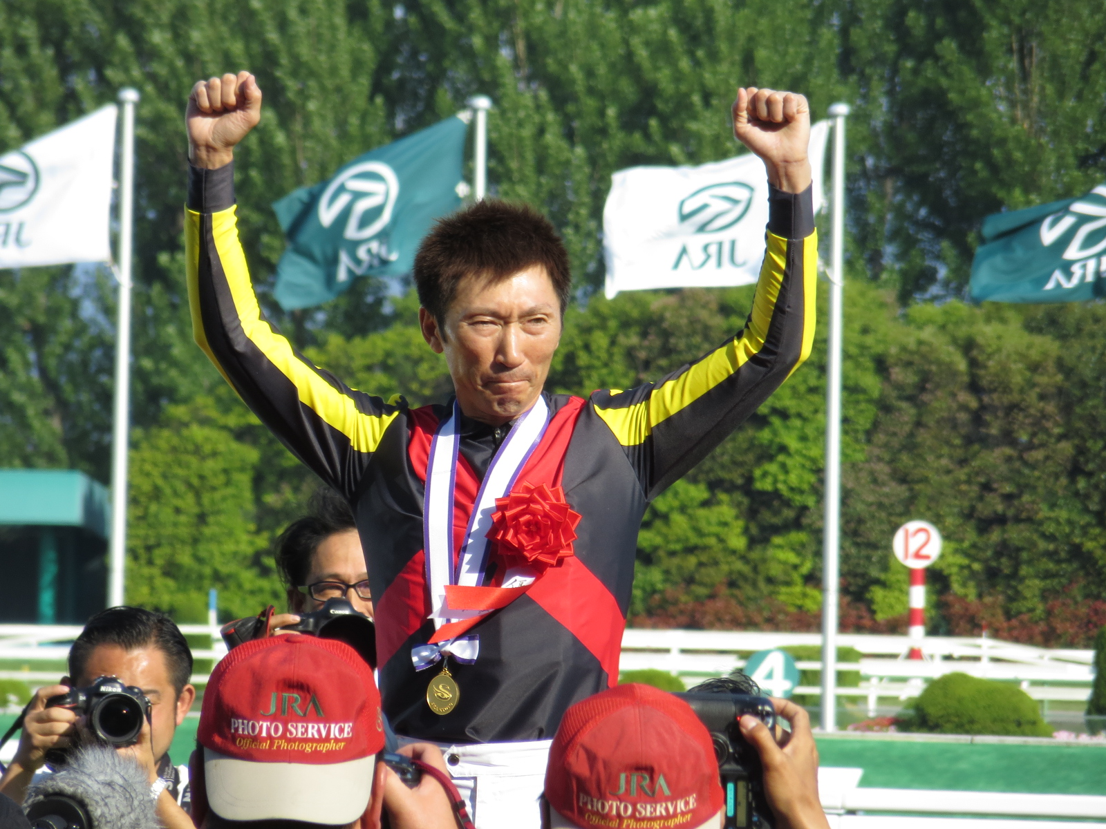 勝利騎手・蛯名正義。なんか好調やね＾＾ 2年連続で光景を見ることになるとは・・・ね＾＾； 大事なことなので2回言いました＾＾； あ、誰か来てるの忘れてた＾＾；；